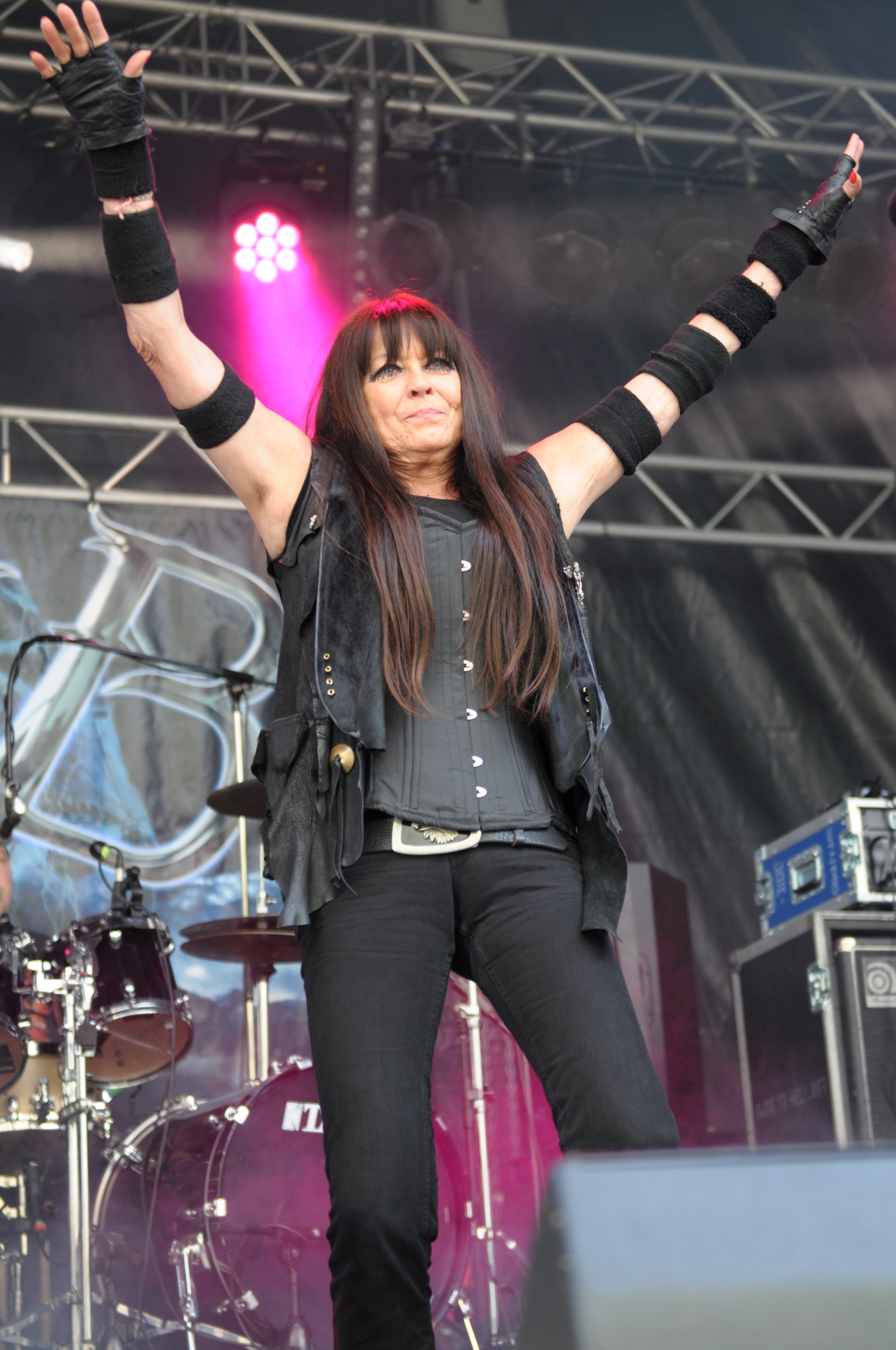 Jutta Weinhold Band, Bäääm festival 2015